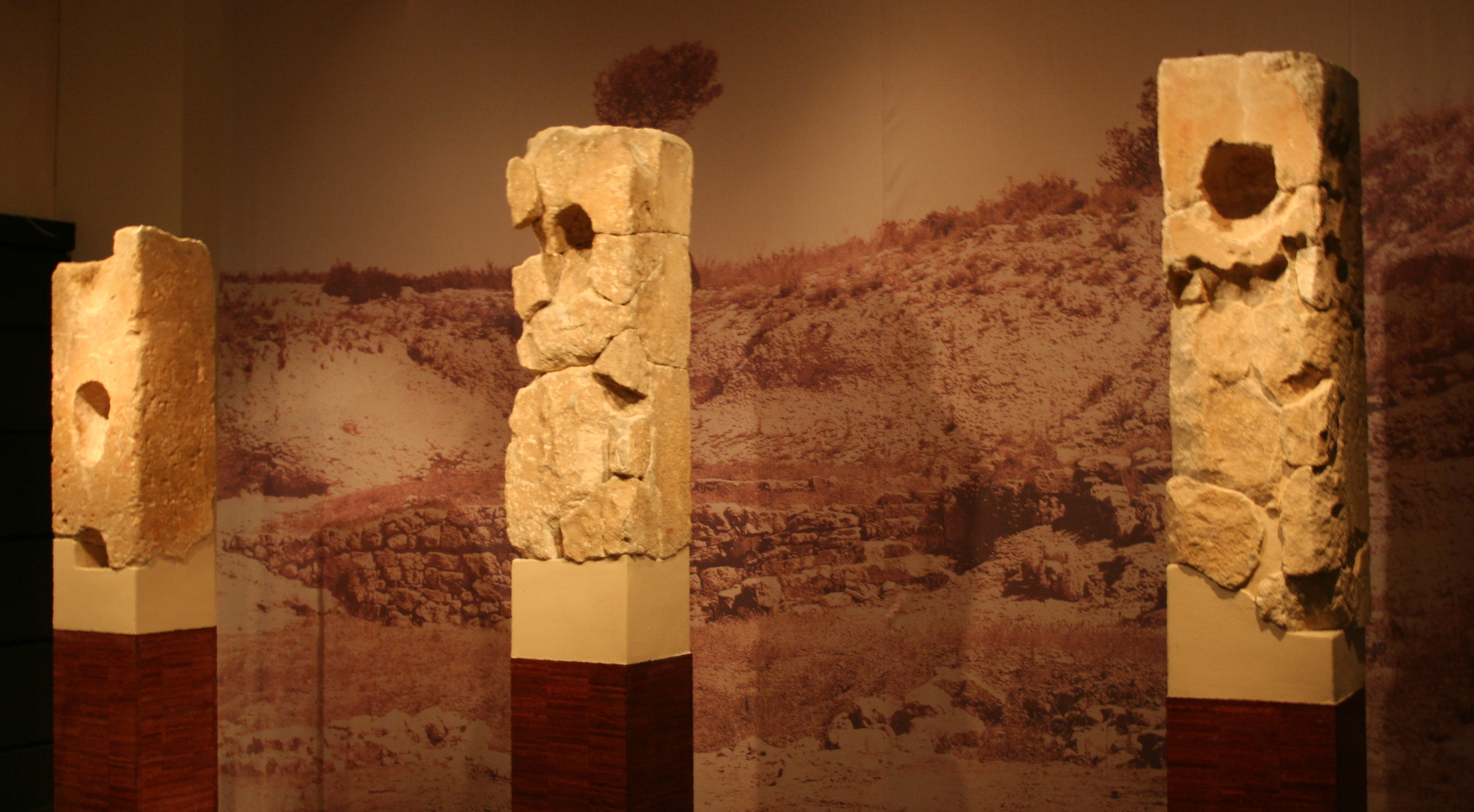 Portique de Roquepetuse (Bouches-du-Rhône). Les piliers ont des alvéoles creusés servant à recevoir des crânes, probablement ceux d'ennemis décapités. Culture Celto-Ligure, IIIe-IIe siècle av. J.C., musée d'archéologie méditerranéenne de la vieille Charité à Marseille.